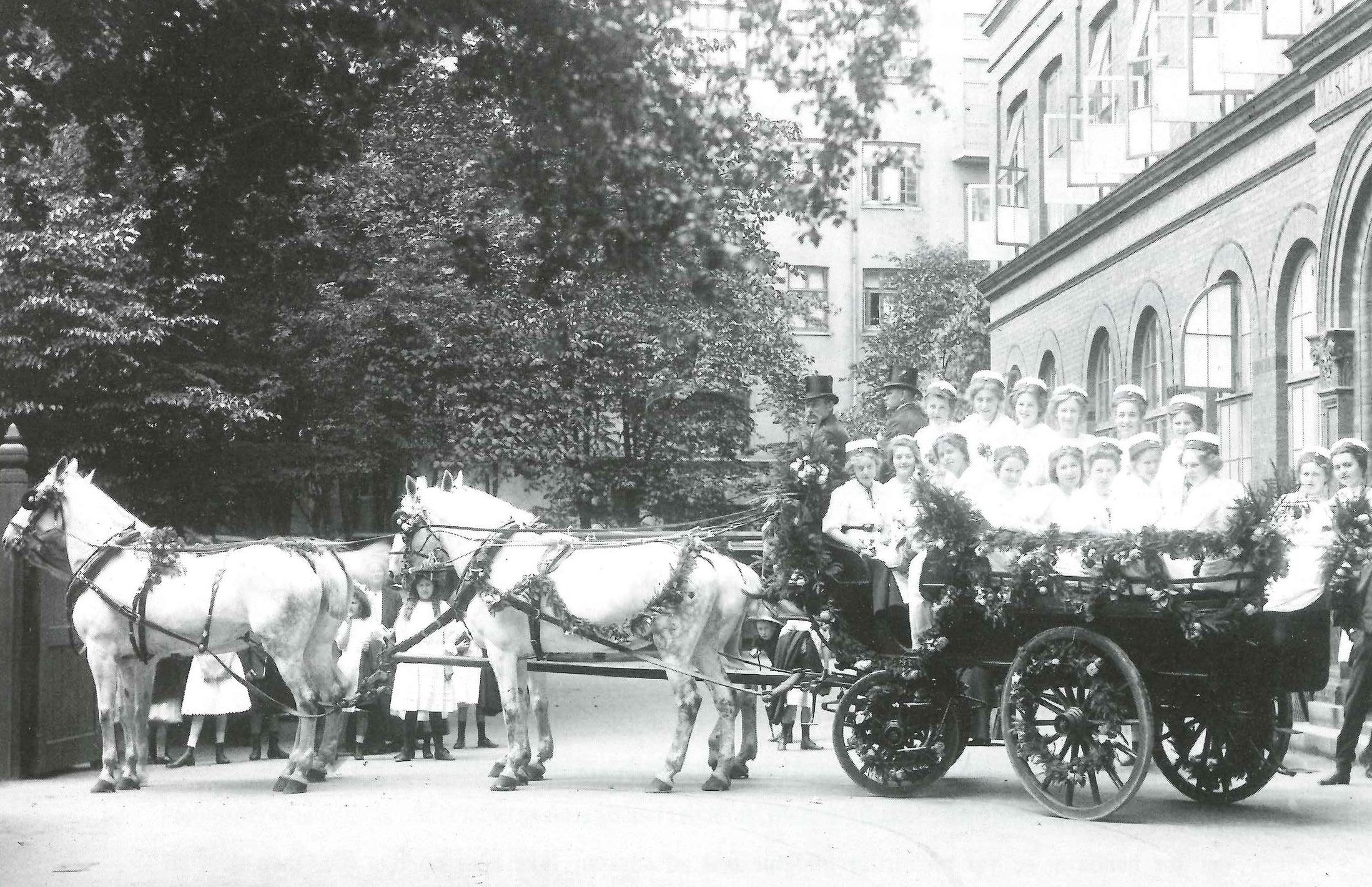 Skolens første gymnasieklasse, der sprang ud som studiner i 1911.